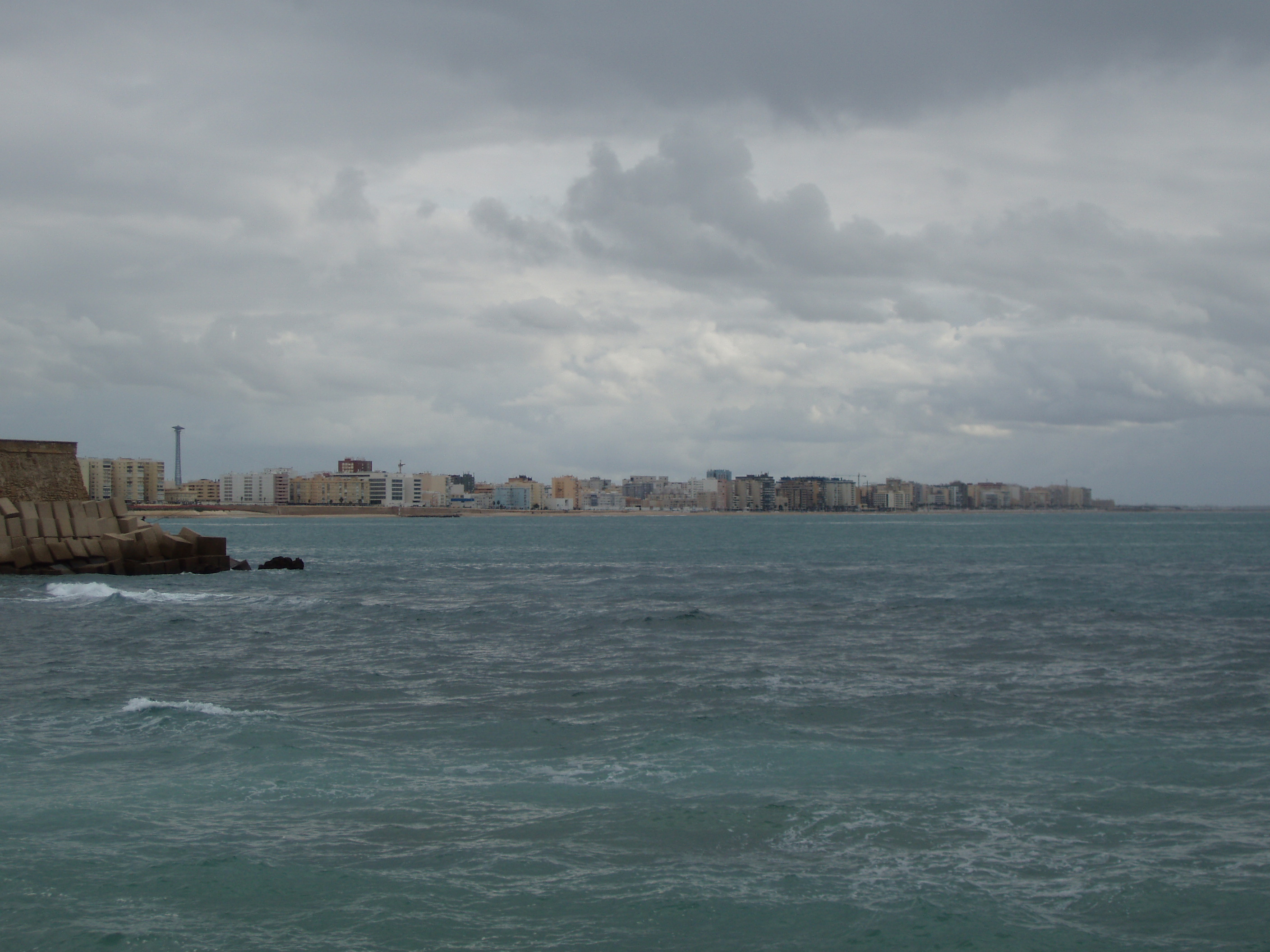 Cádiz a lo lejos